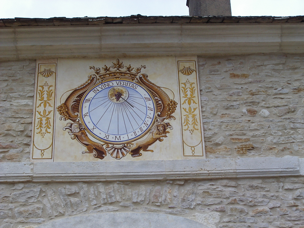 Pommard (Côte-d'Or, Bourgogne, France). Cadran solaire, château de Pommard.